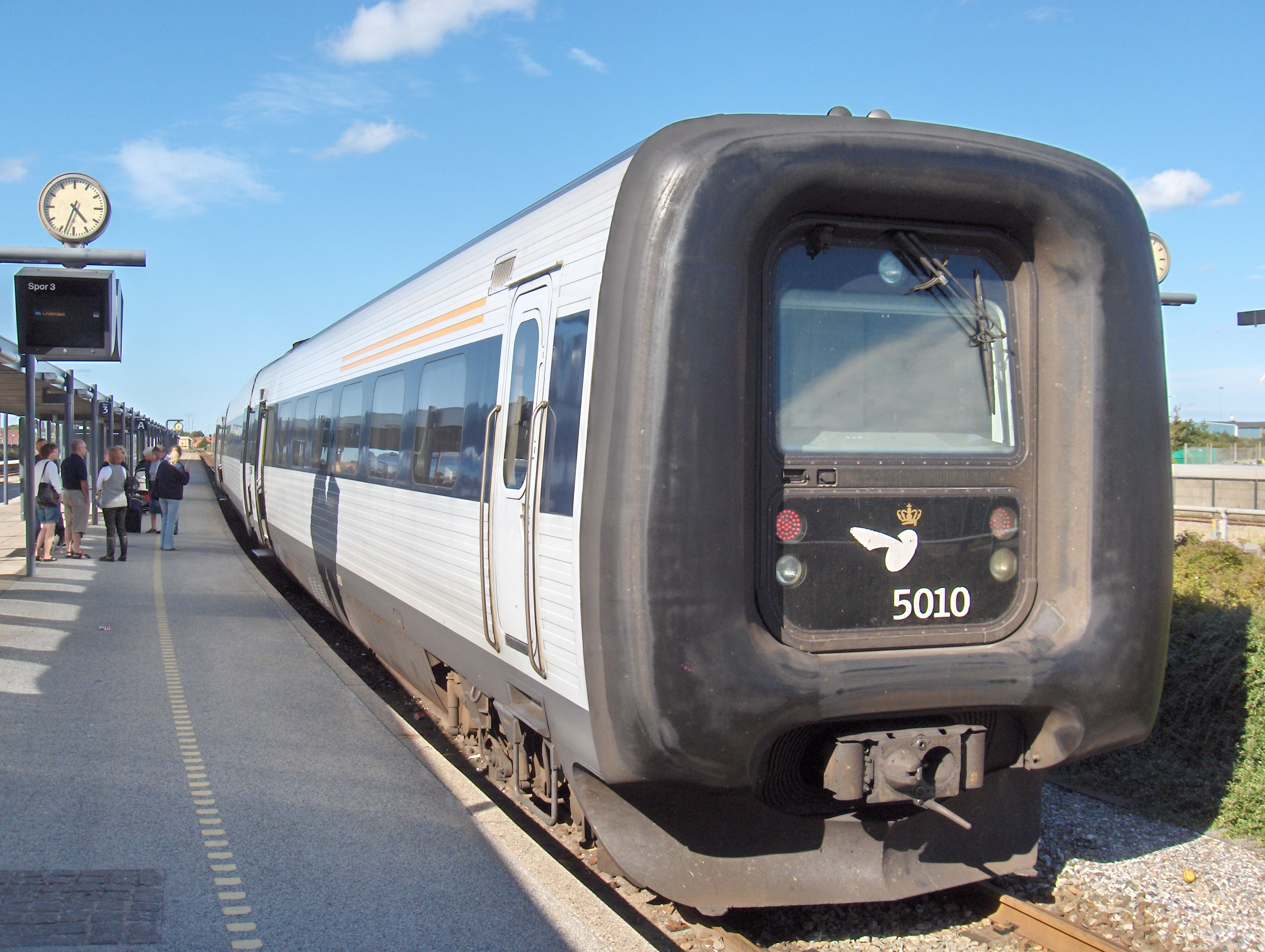 DSB "IC3" train at Frederikshavn, Denmark